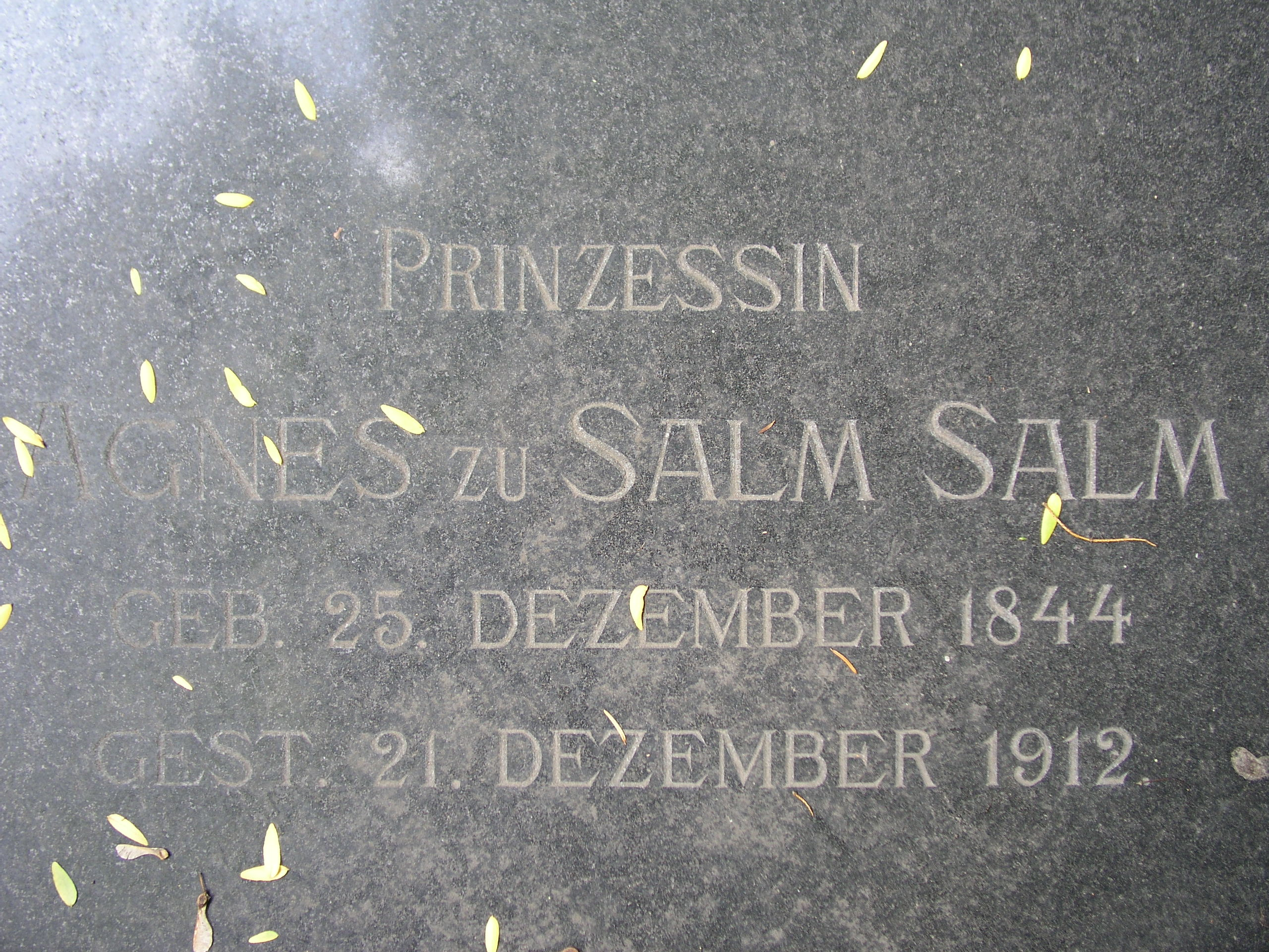 Inschrift auf dem Grabstein auf dem Alten Friedhof in Bonn (D)